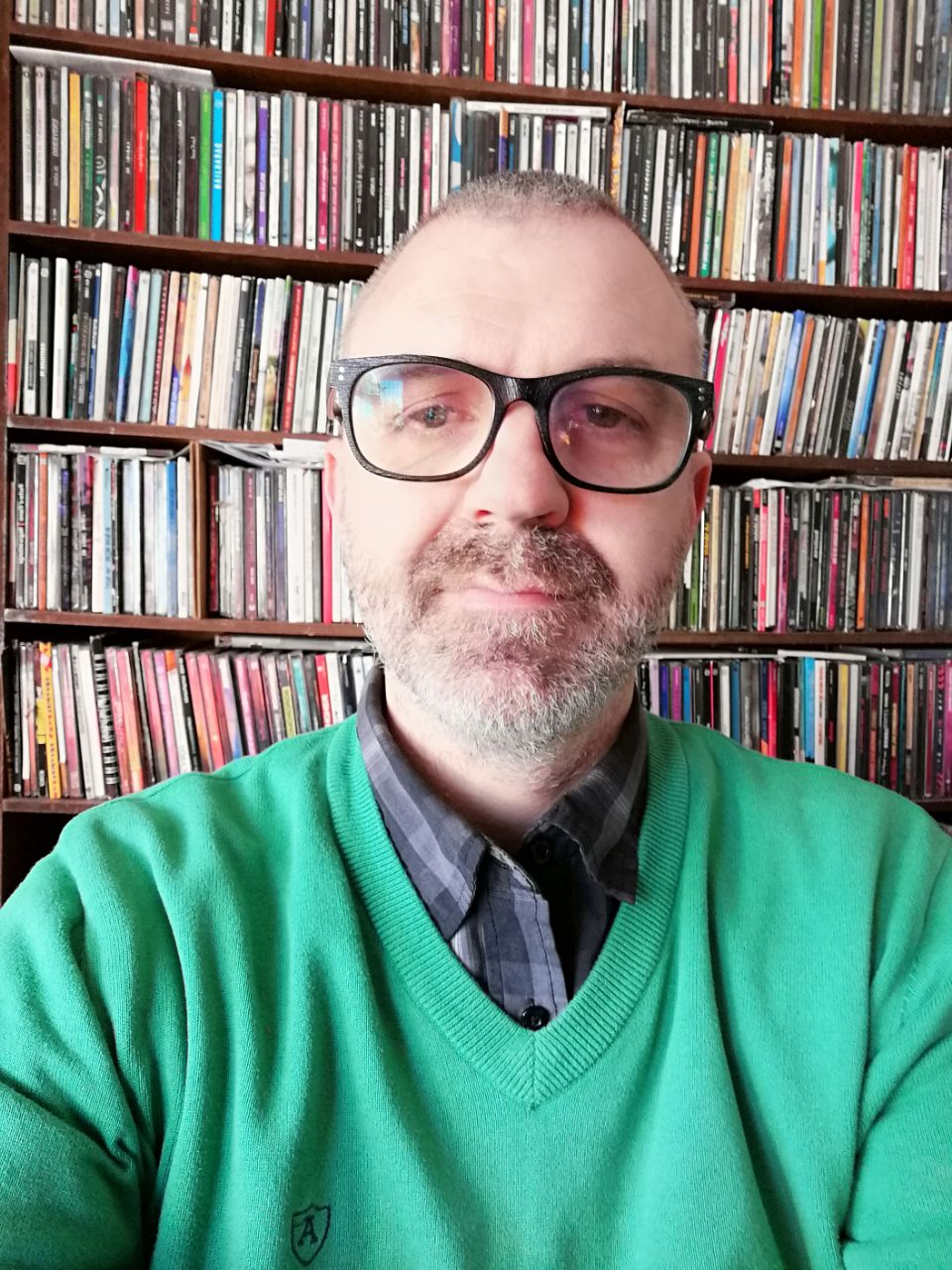 Javier Alfonso en 2019